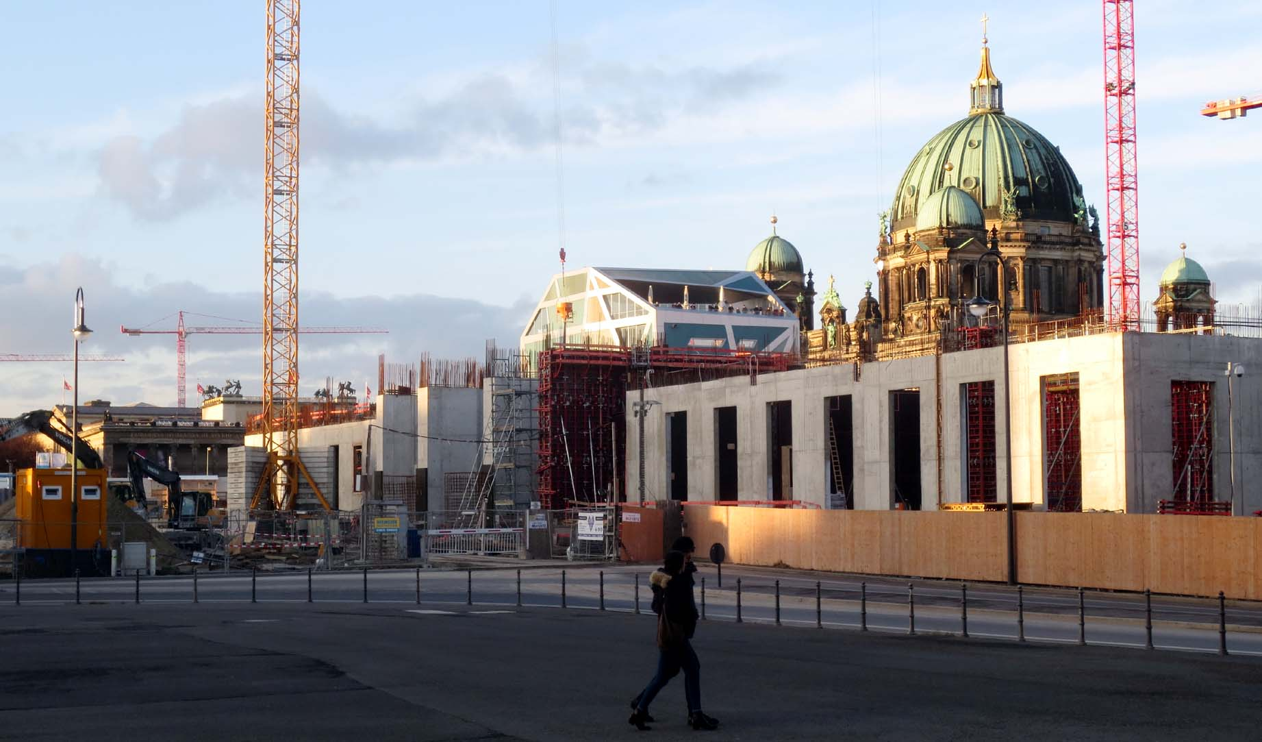 Wiederaufbau des Berliner Schlosses. Februar 2014